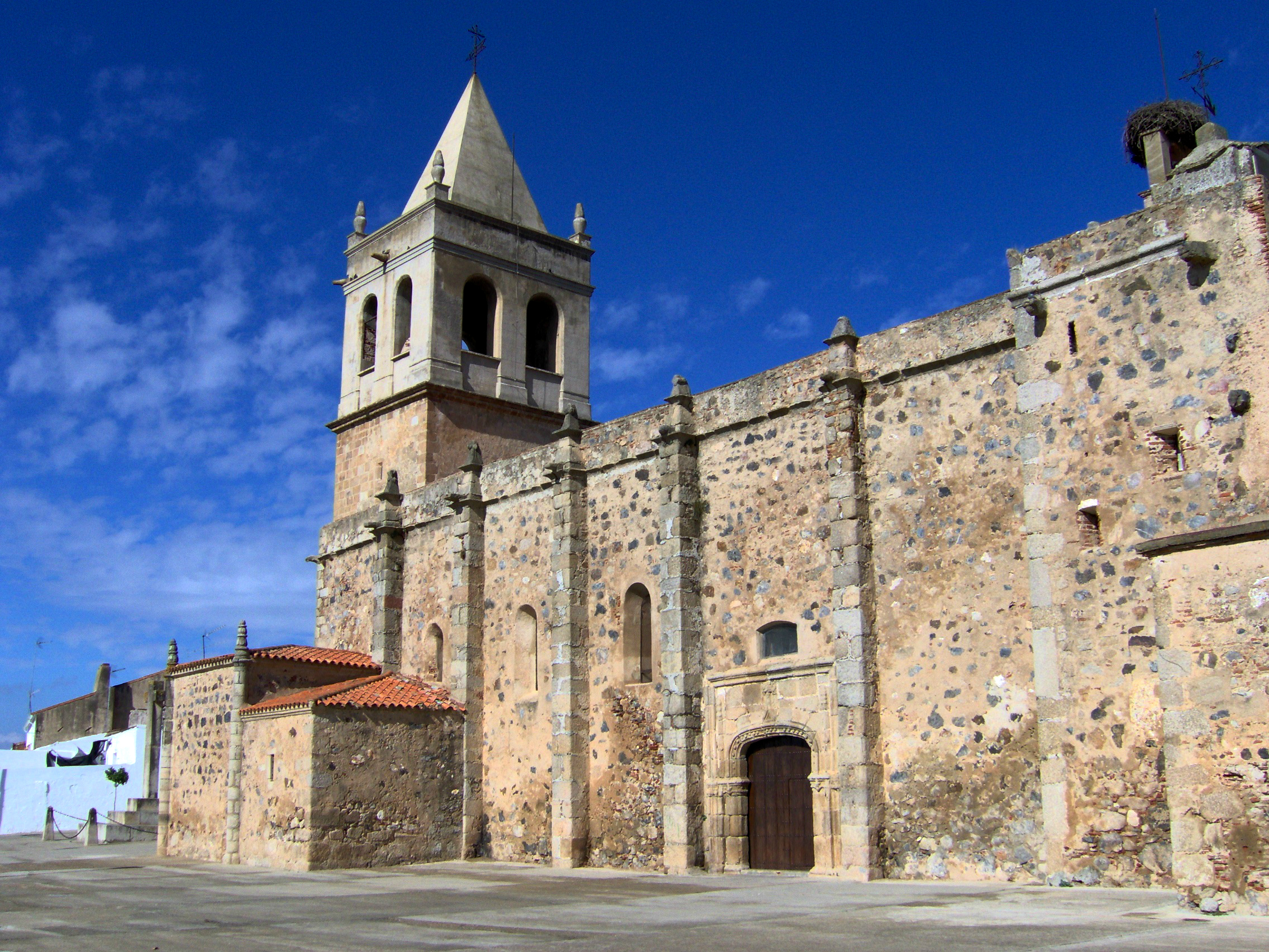 Iglesia parroquial Ntra. Sra. de la Asunción, La Garrovilla.